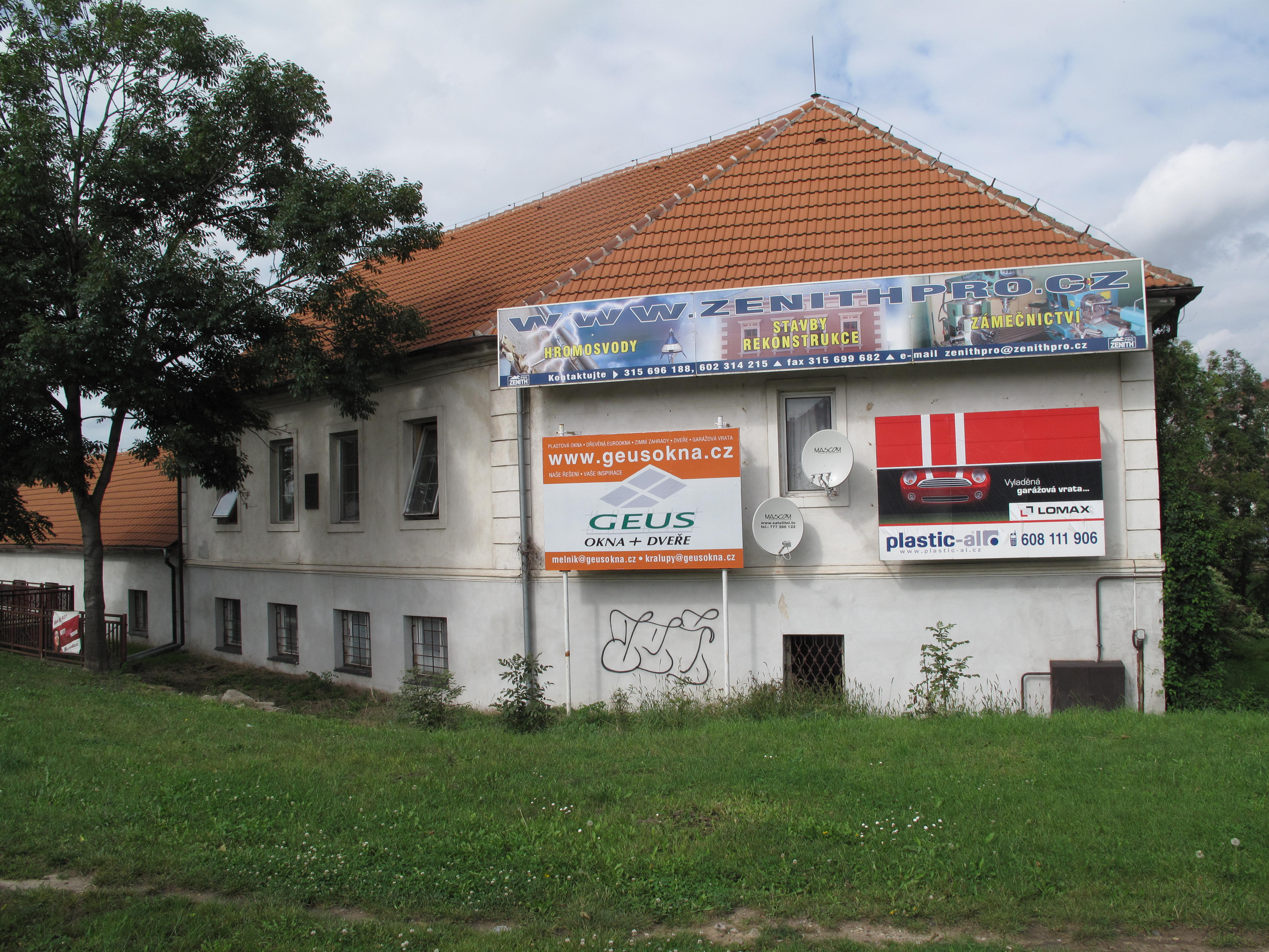 Rodný dům Viktora Dyka, Mělník, Bezručova 779/62, pův. čp. 84.